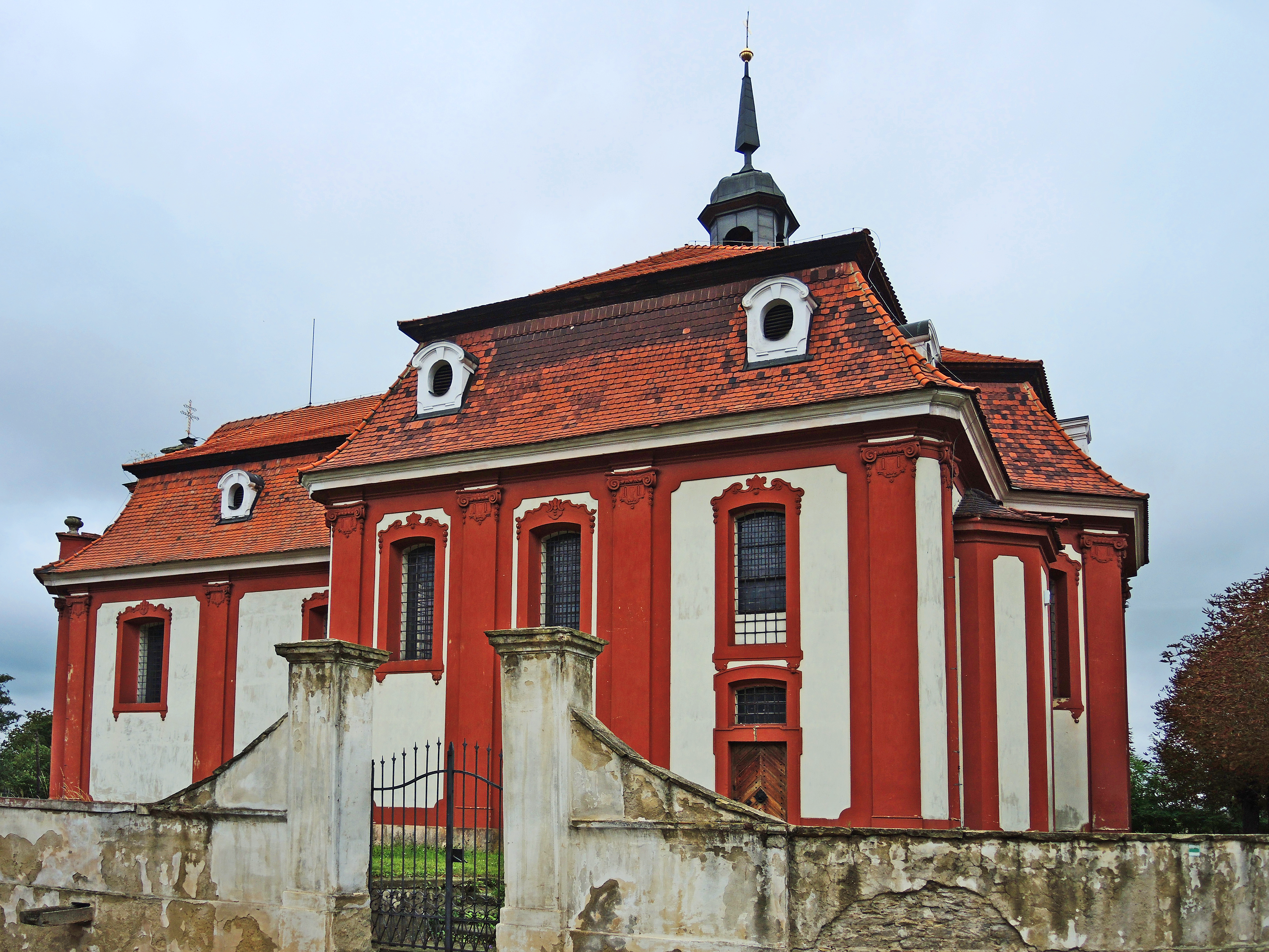 Kostel svatého Havla, Liběchov.